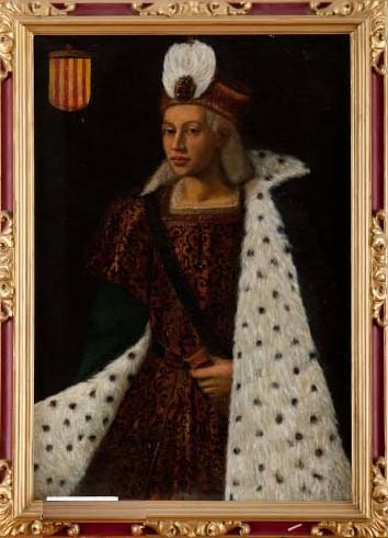 Retrat imaginari del comte Ramon Berenguer II de Barcelona